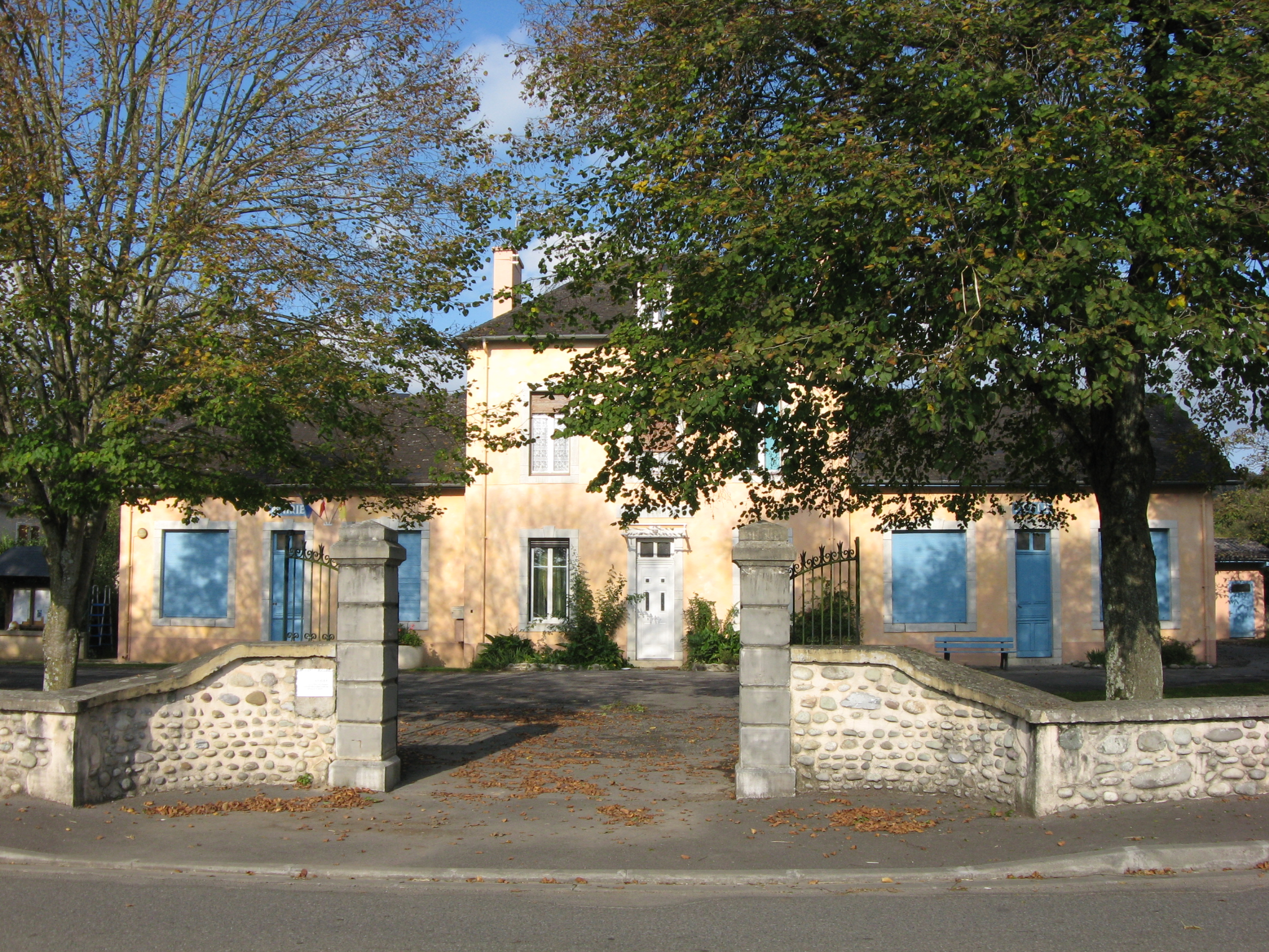 Ecole de Verdets (Pyrénées Atlantiques) Pyrénées).